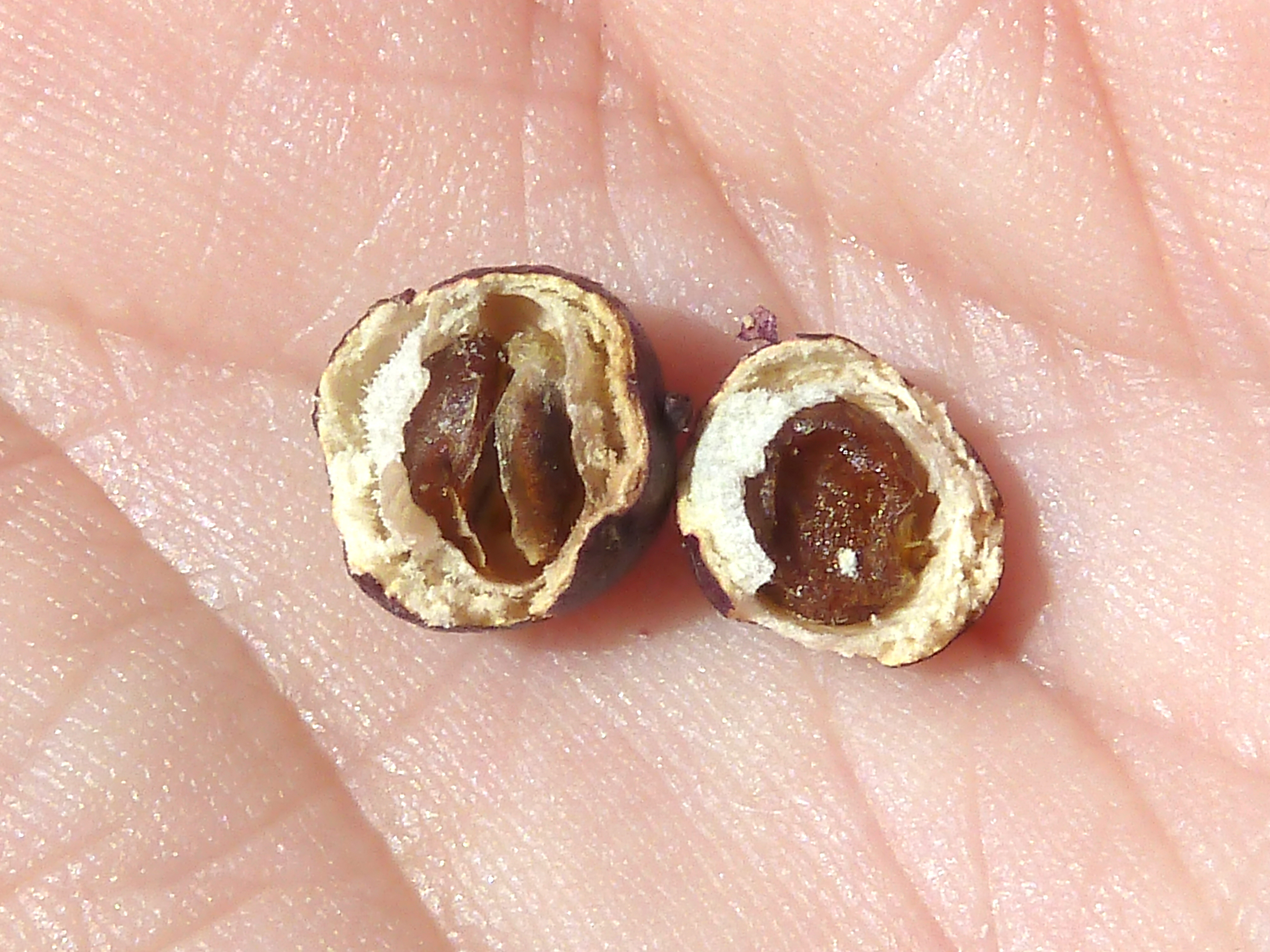 Nandina domestica ( Bambú sagrado) - Frutos maduros sueltos abiertos con semillas in situ. -Cultivado/ornamental, Paseo de El Salvador, Parque del Buen Retiro, Madrid (España).